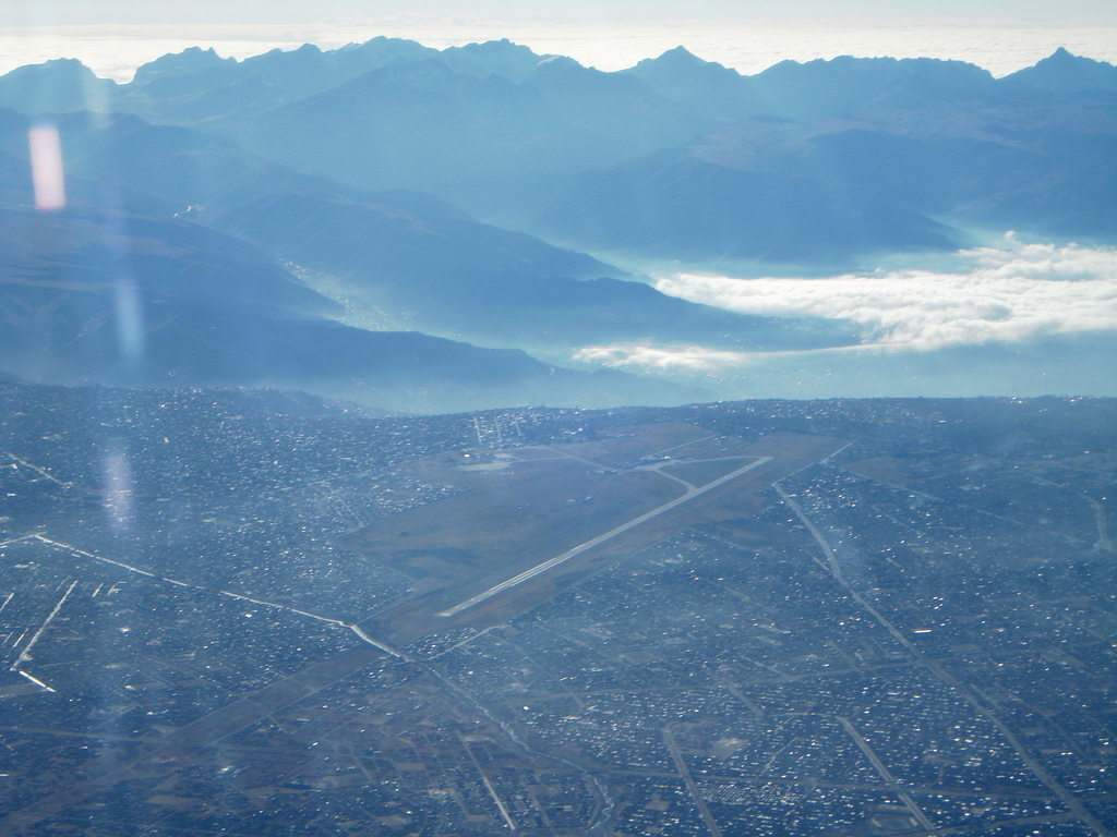 Vista aérea del Aeropuerto Internacional El Alto